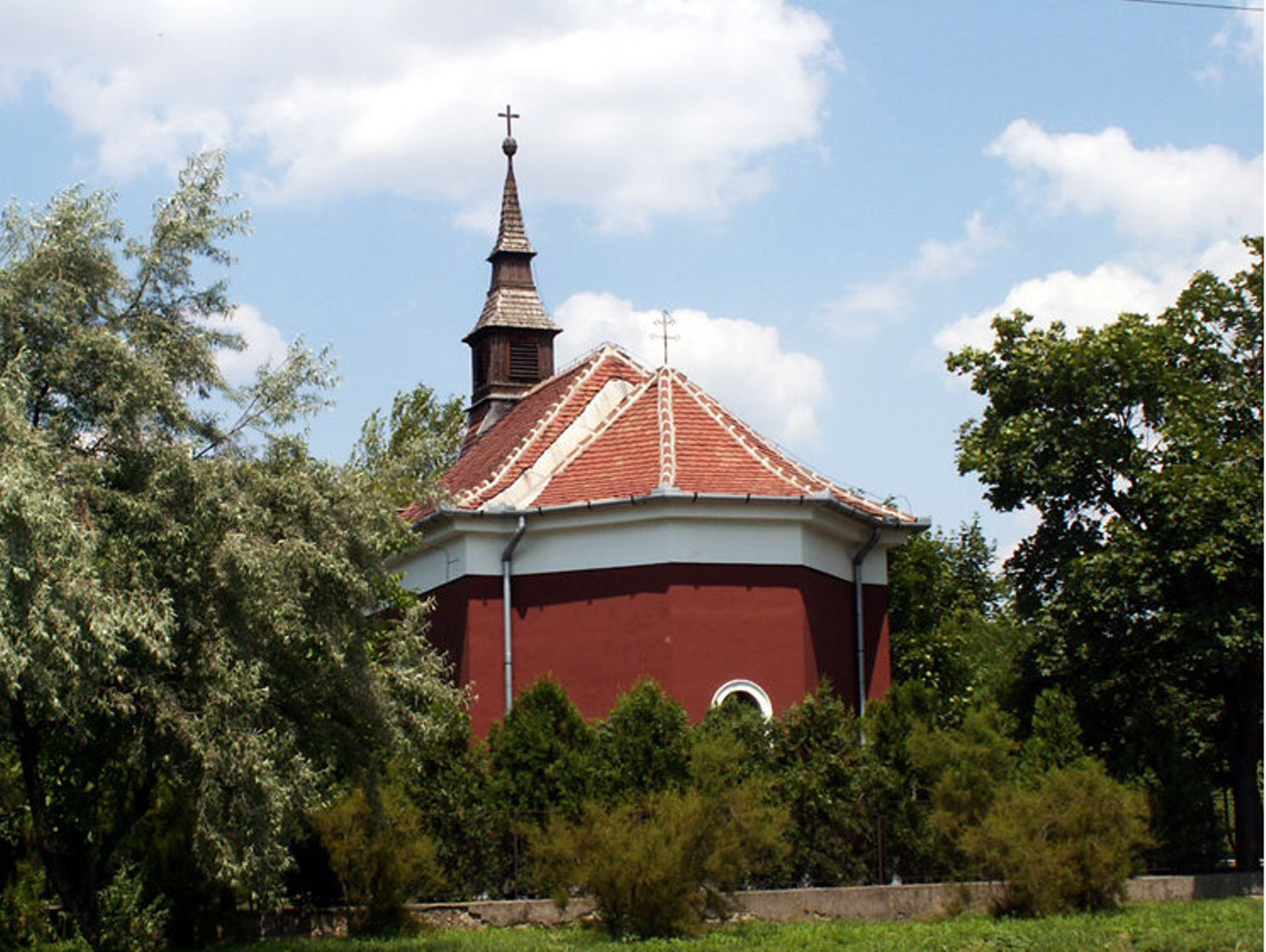 Grassalkovich-kápolna Budapest. XVIII. Margó Tivadar- Sallai Imre u. sarok Fotó: Varga Máté This is a photo of a monument in Hungary. Identifier: 1253